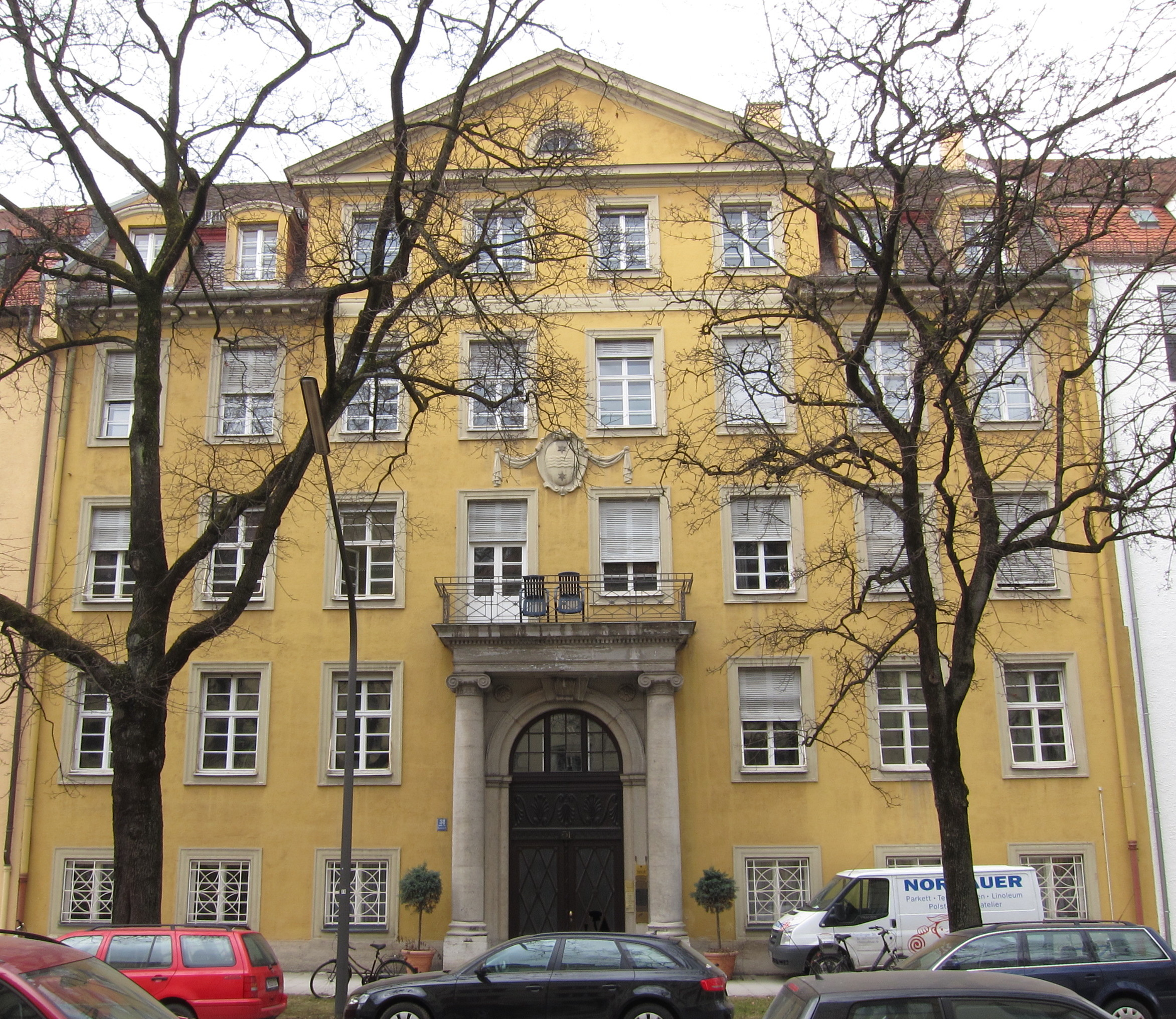 Mauerkircherstraße 31; ehemaliges Verwaltungsgebäude der Mittlere Isar AG, neuklassizistisch, mit Säulenportal, 1921 von Carl Jäger; samt Rückgebäude.